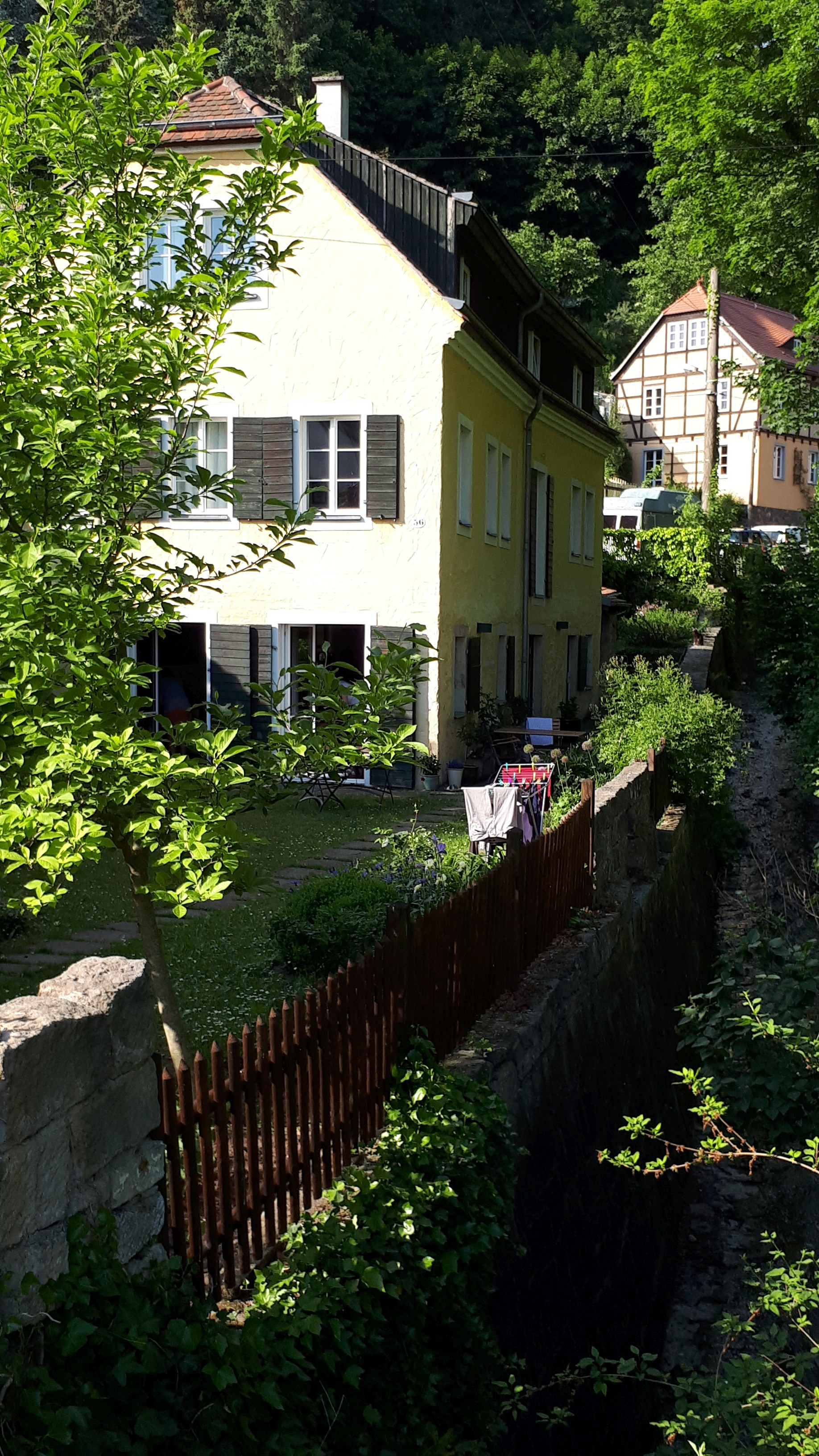 Wachwitzbach